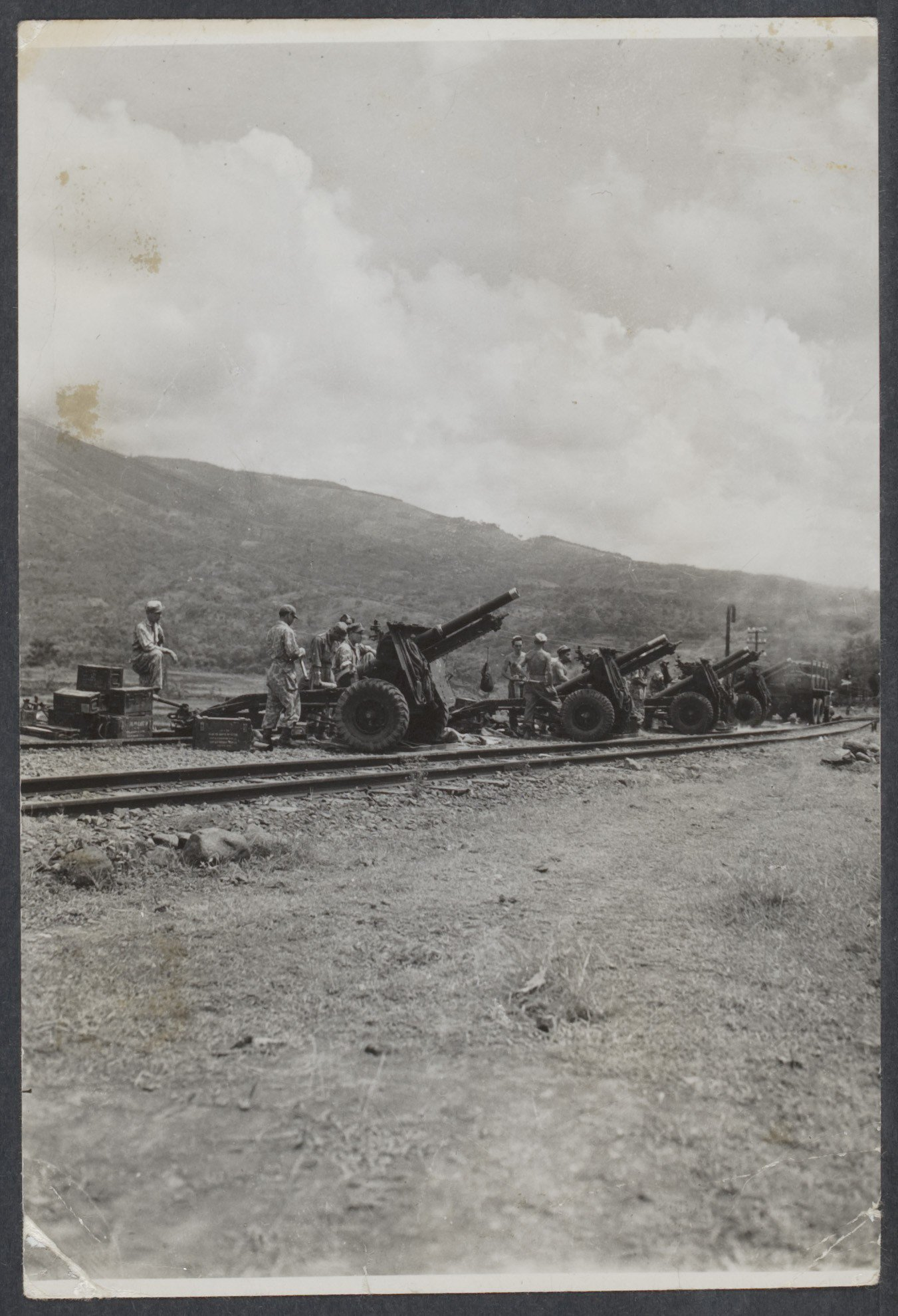 Collectie / Archief : Fotocollectie Spaarnestad Onderwerpen Reportage / Serie : Staatsvorming Indonesië: Landoorlog. Mi. Beschrijving : Ambarawa: De 2e batterij van de 1ste Afdeling Veldartillerie KNIL in vuurlinie tijdens een zuiveringsactie bij Djamboe. Met de luchtwaarnemer wordt voortdurend contact gehouden Datum : 12 oktober 1947 Locatie : Indonesië Trefwoorden : bestuur, grenzen, grondwetten, staatkunde, staatsvorming Fotograaf : Krieken, [...] van / DLC Auteursrechthebbende : Nationaal Archief Materiaalsoort : Foto (zwart/wit) Nummer archiefinventaris : bekijk toegang 7.000SPAond Inventarisnummer : 344025 Bestanddeelnummer : 344025_068